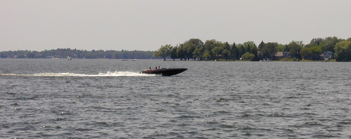 Lake Cadillac